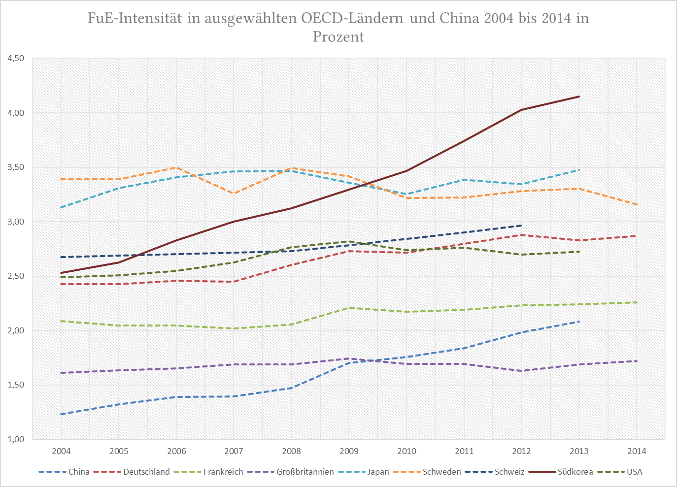 FuE-Intensität in ausgewählten OECD-Ländern und China 2004 bis 2014 in Prozent. FuE-Intensität: Anteil der Ausgaben für Forschung und Entwicklung einer Volkswirtschaft am Bruttoinlandsprodukt (BIP). Südkorea.